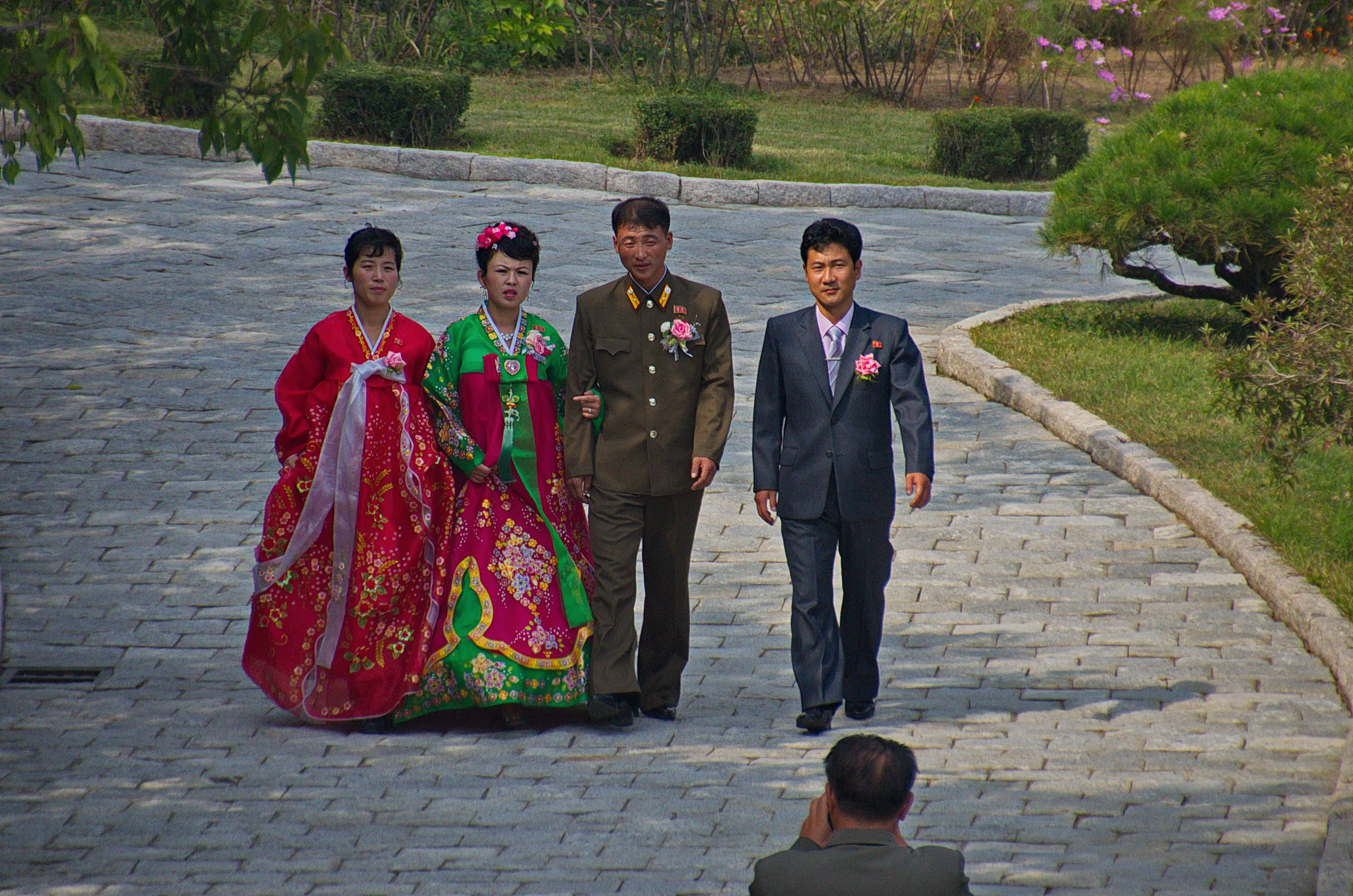 Nordkorea 2015 - Hamhung